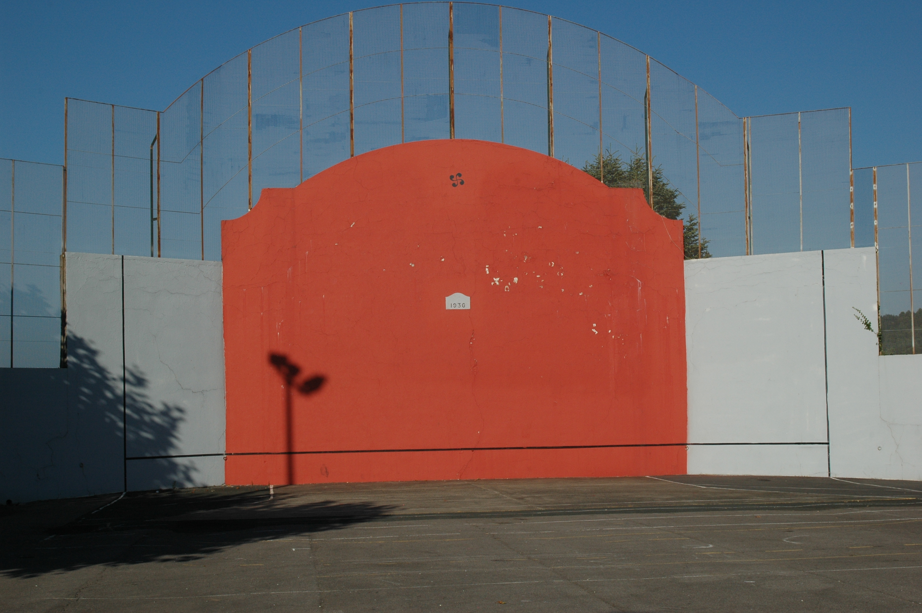 Urrugne, fronton place libre